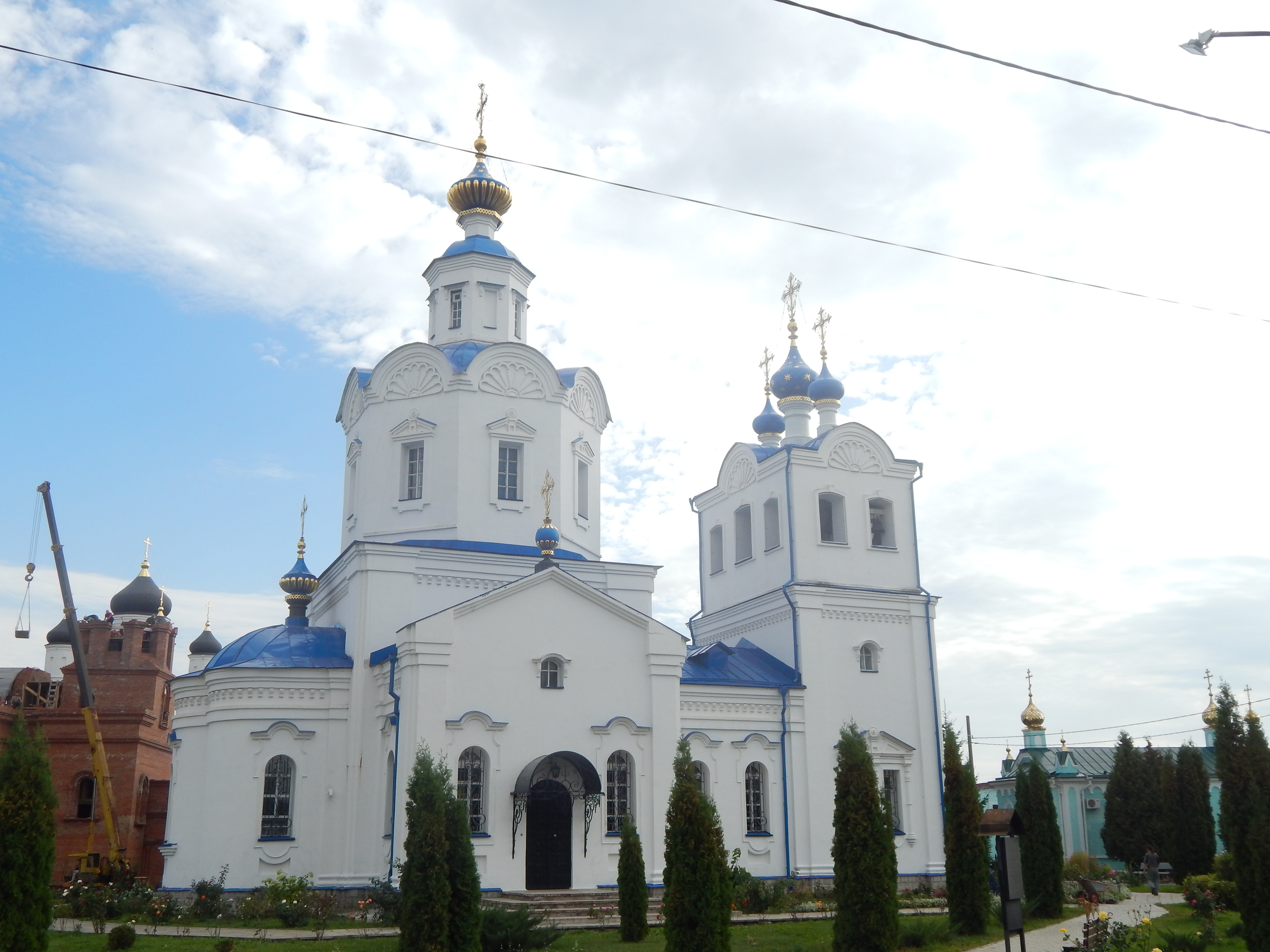 Кирпичная церковь, построенная в 1688 (по другим данным в 1691) игум. Евфимием, с приделом Рождества Предтечи (1700). Успенский мужской монастырь: улица Ермолова, 11, Орёл, Орловская область